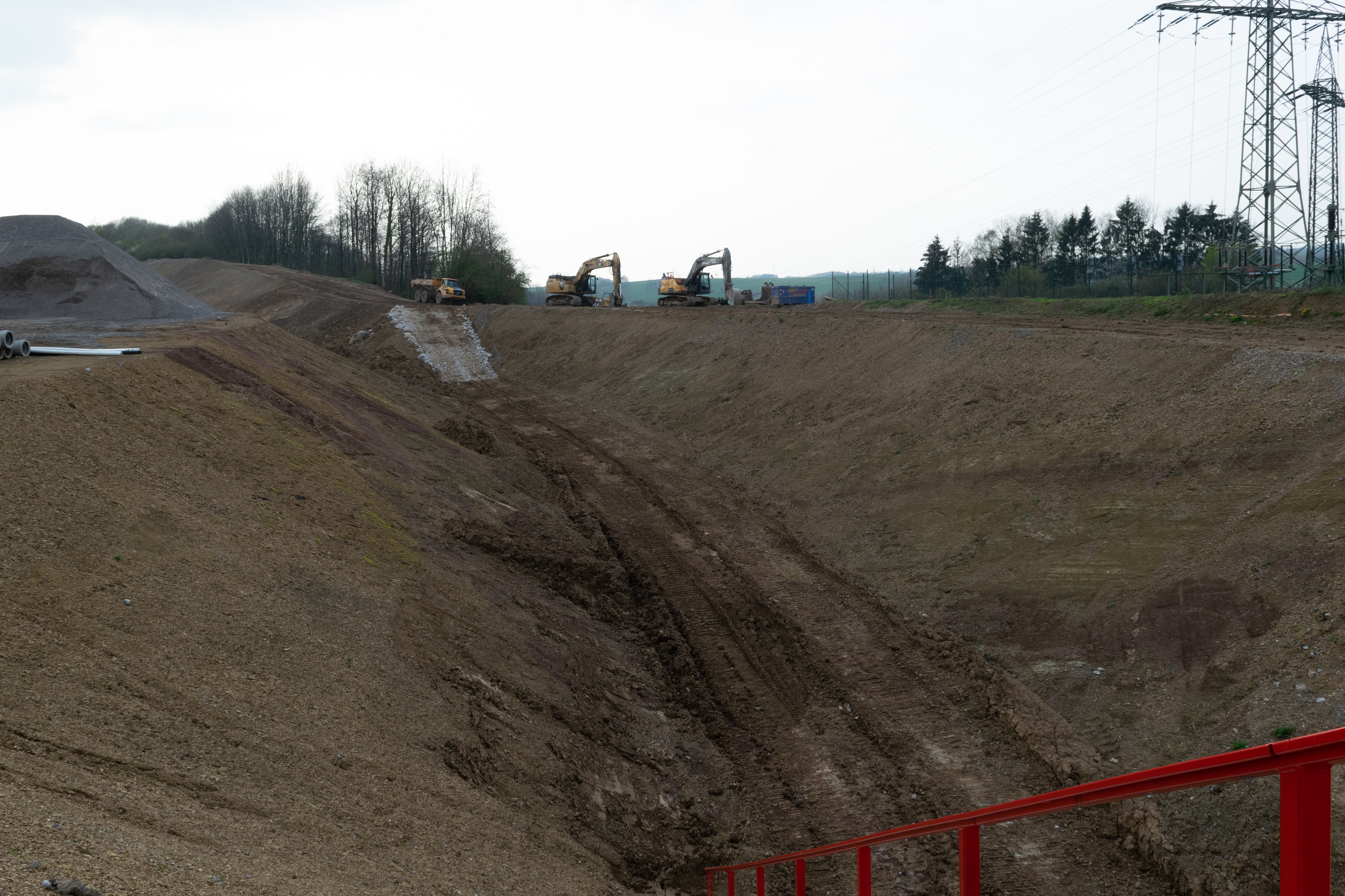 Dornaper Straße, Wuppertal